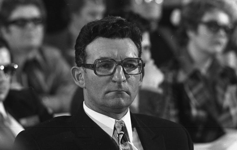 Bundesparteitag der SPD in Hannover (Klaus Dieter Arndt) 10.-14.4.1973